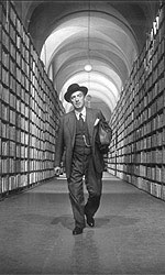 Nino Taranto in "Anni facili" (Zampa, 1953)